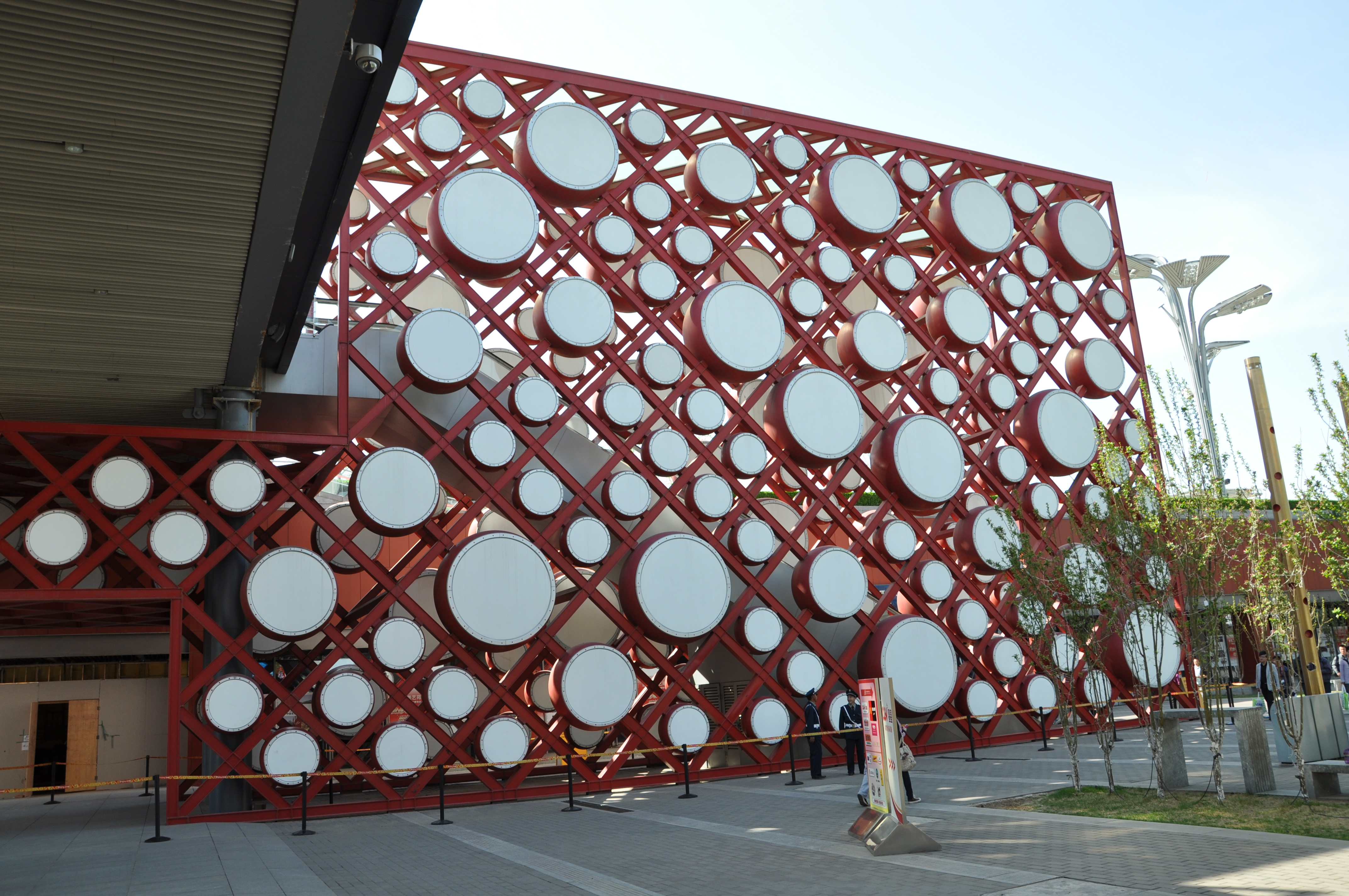 奥林匹克公园下沉花园3号院——礼乐重门。架上为响鼓，内部有灯，夜晚可打开作为夜景。